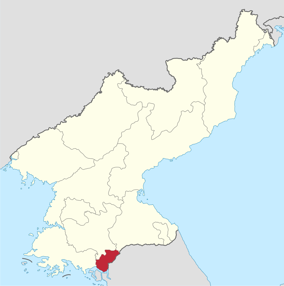 Localisation de la Zone Économique Spéciale de Kaesong